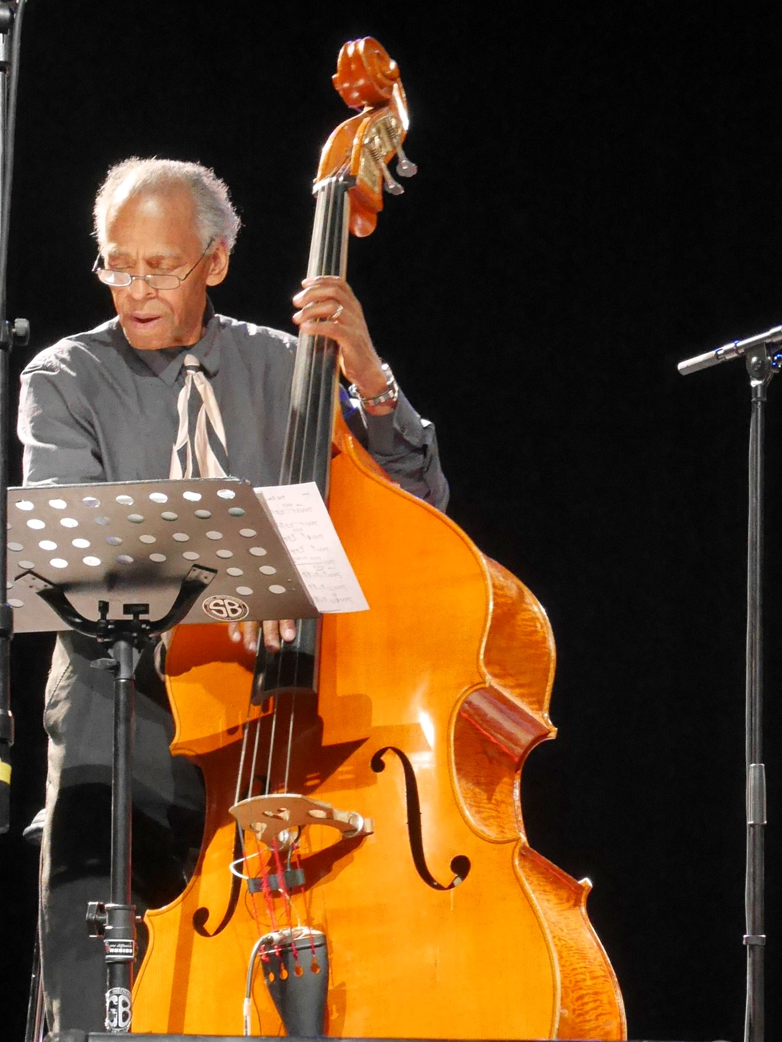 Cecil McBee, The Cookers Nice 2016.jpg